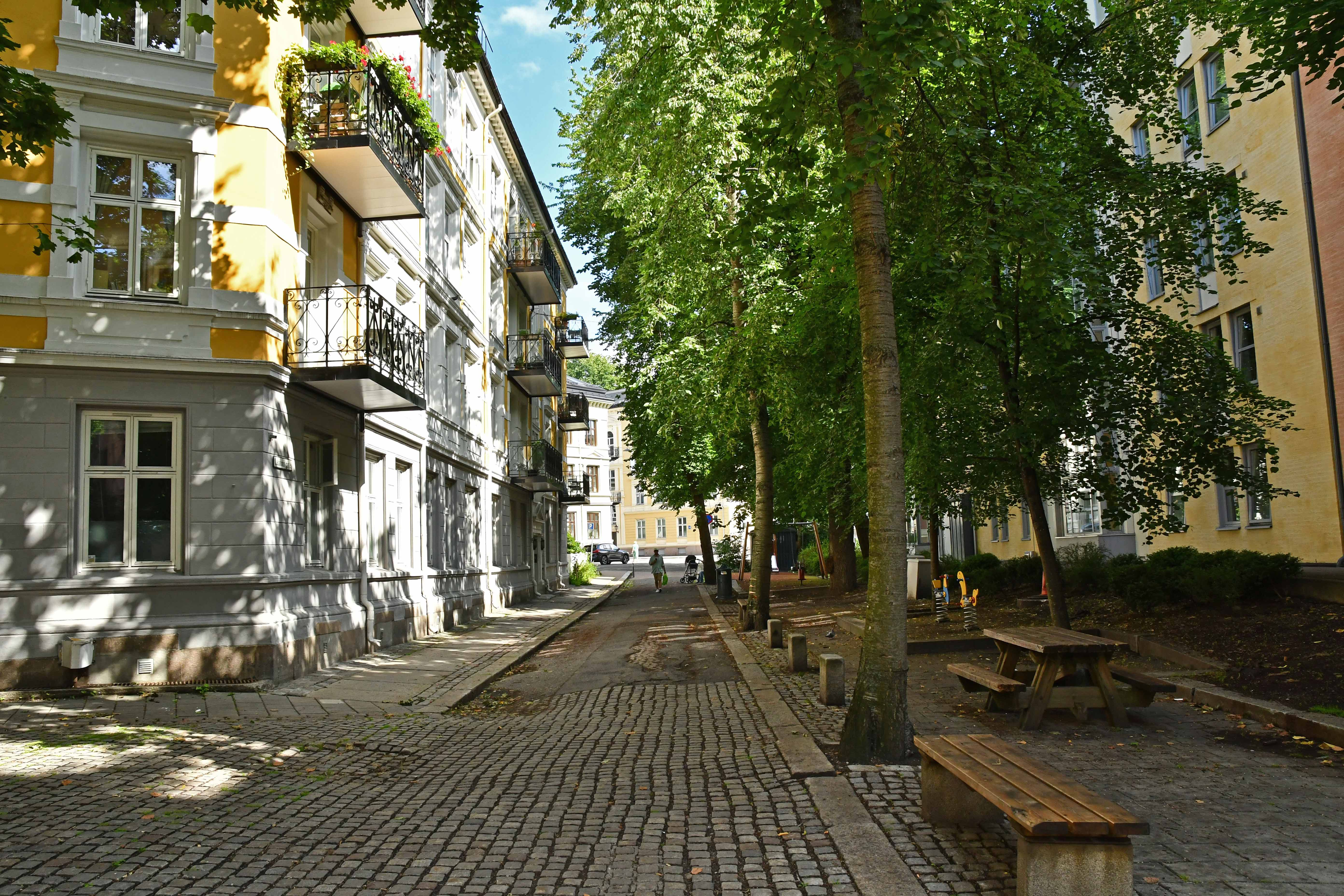 Gatetun i Lassons gate, Ruseløkka, sett fra krysset med Hansteens gate